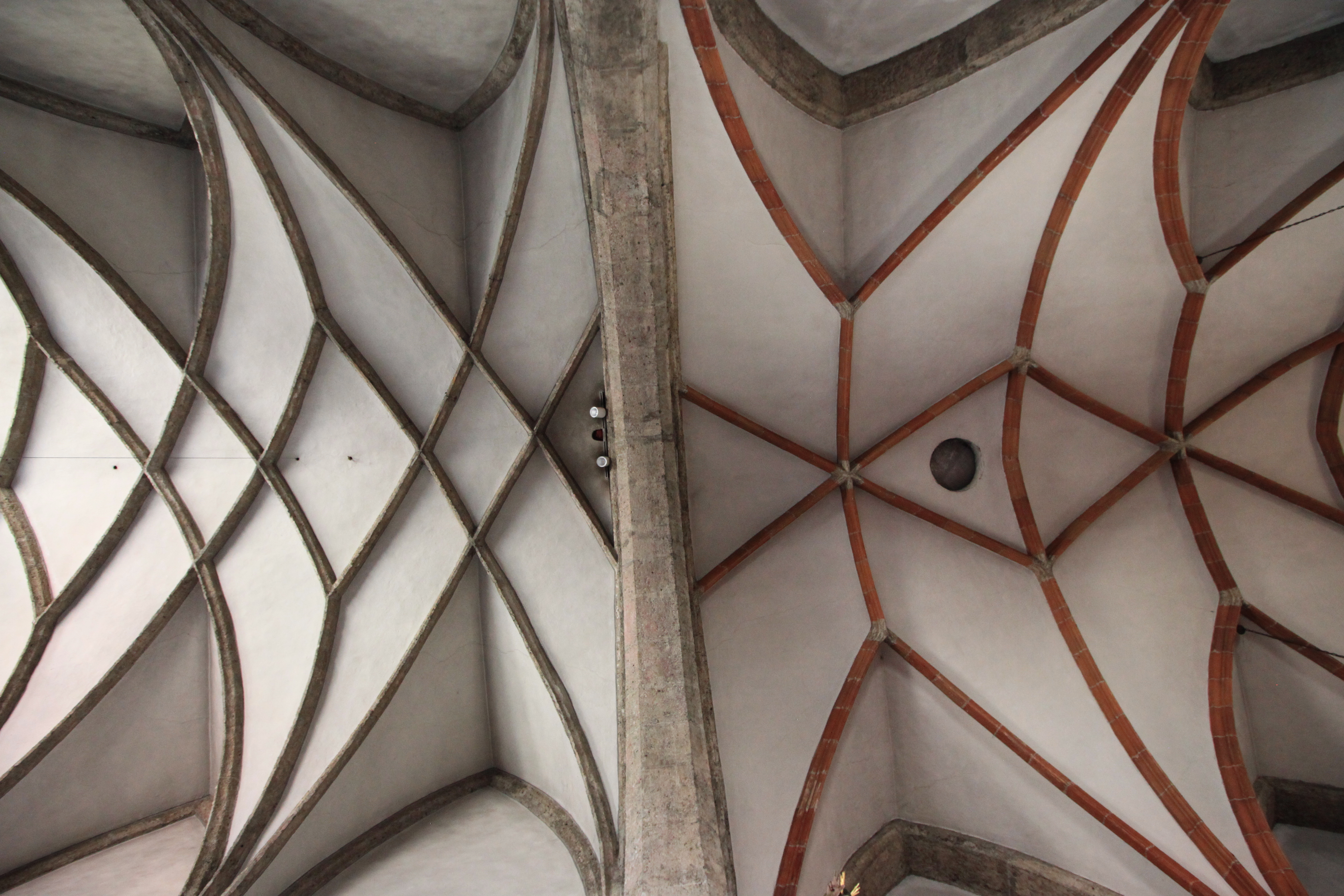 Kath. Pfarrkirche hl. Martin in Straßwalchen, Gewölbesituation, links Chor, Chorbogen, rechts Mittelschiff des Langhauses